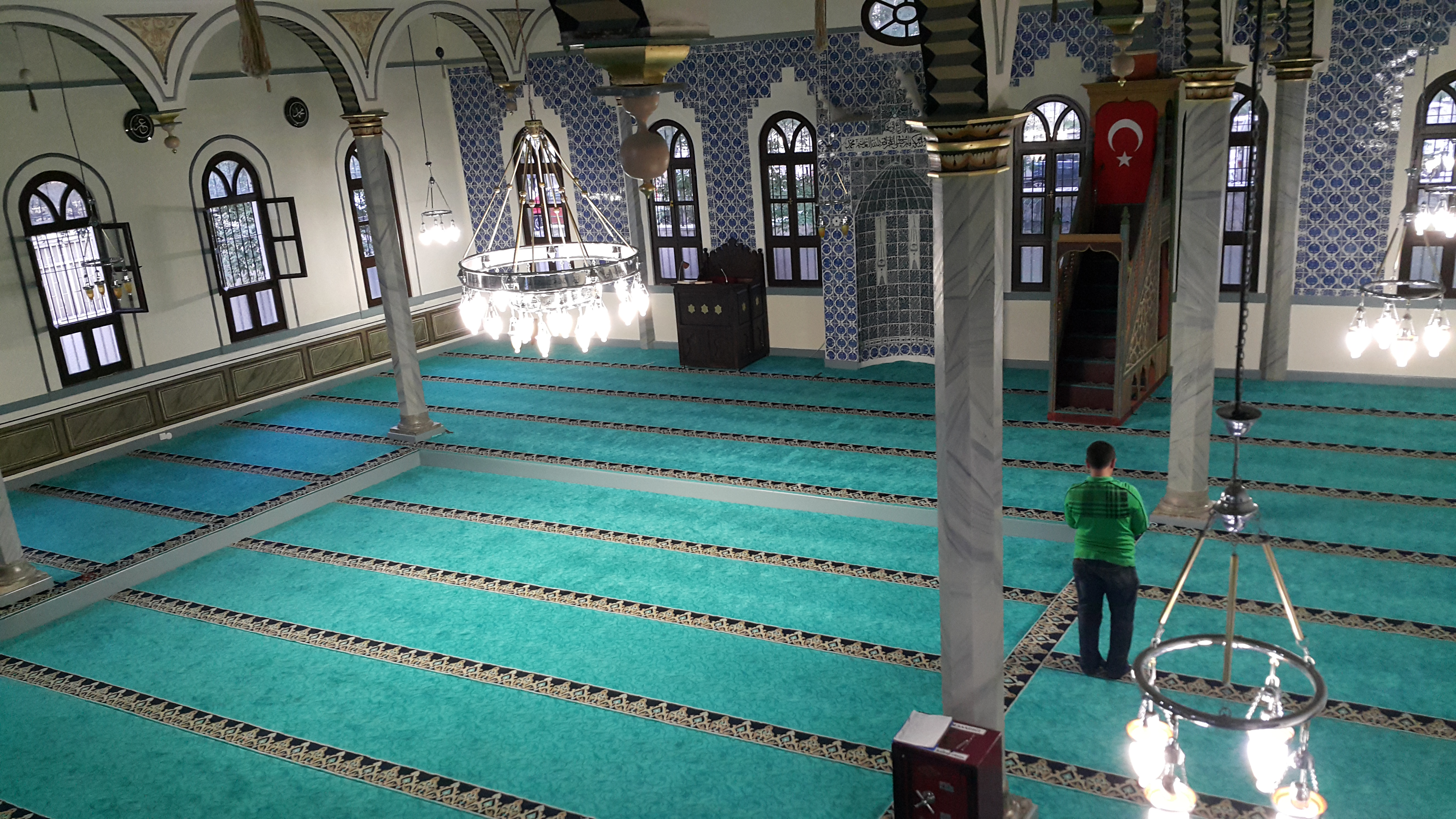 Restorasyon Sonrası Ali Paşa Camii İç Kısmı